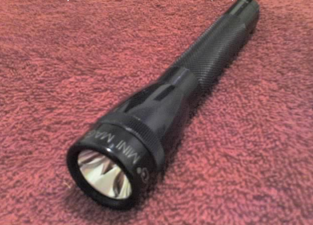 Imagem de coleçao propria, obtida atraves de camera, nao retirado da web.obtido atraves de fotos de acervo da minha coleçao e gentilmente cedidas para a Wikipedia por mim mesmo e estando livre para qualquer finalidade ligada ao uso de coleçao ou simpatia a mesma.